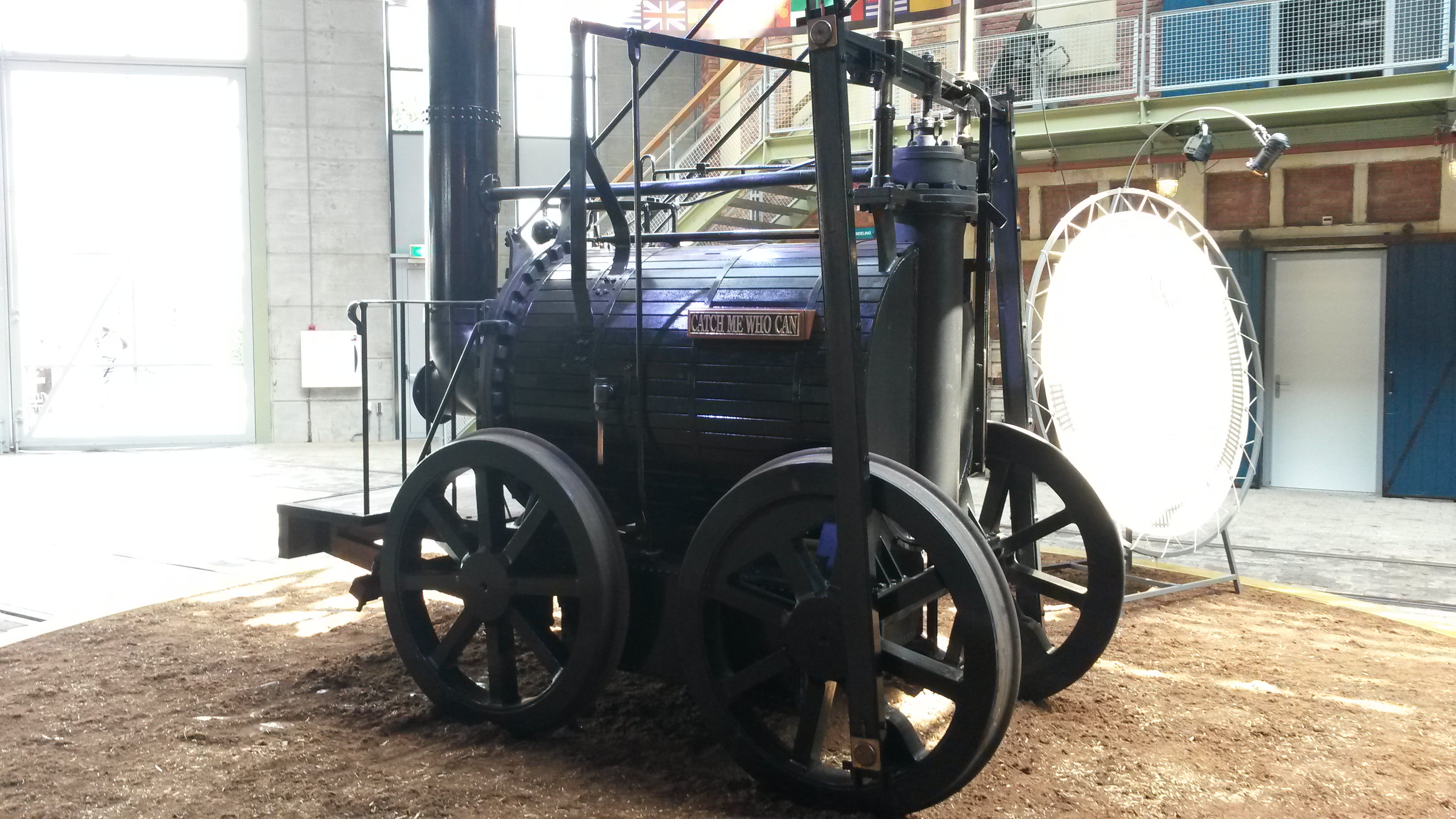 Catch Me Who Can replica displayed in the Nederlands Spoorwegmuseum in Utrecht, The Netherlands